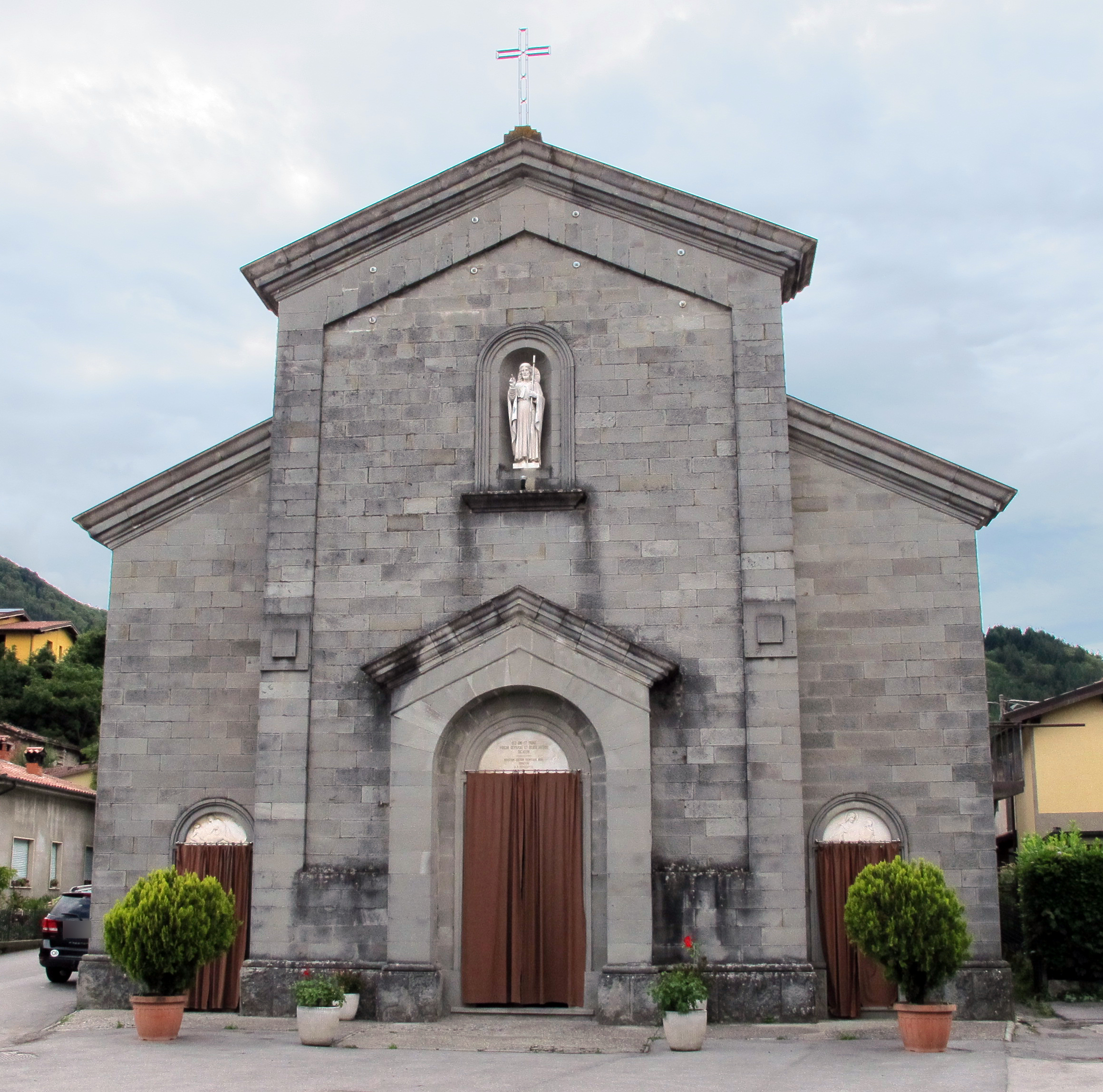 Camporgiano